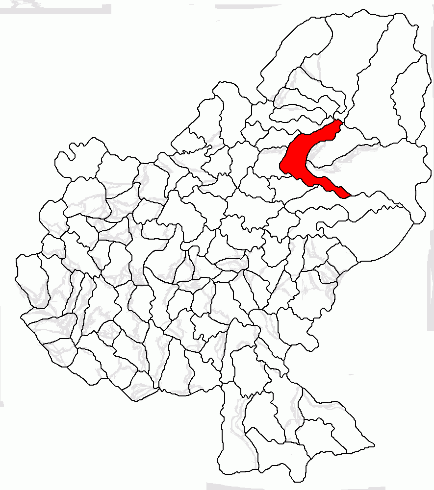 creată de Radufan, am redenumit imaginea corect